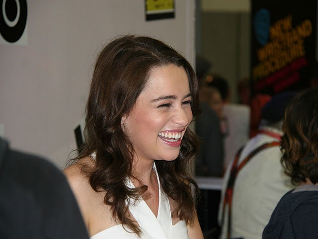 Foto obtenida en ComicCon 2011